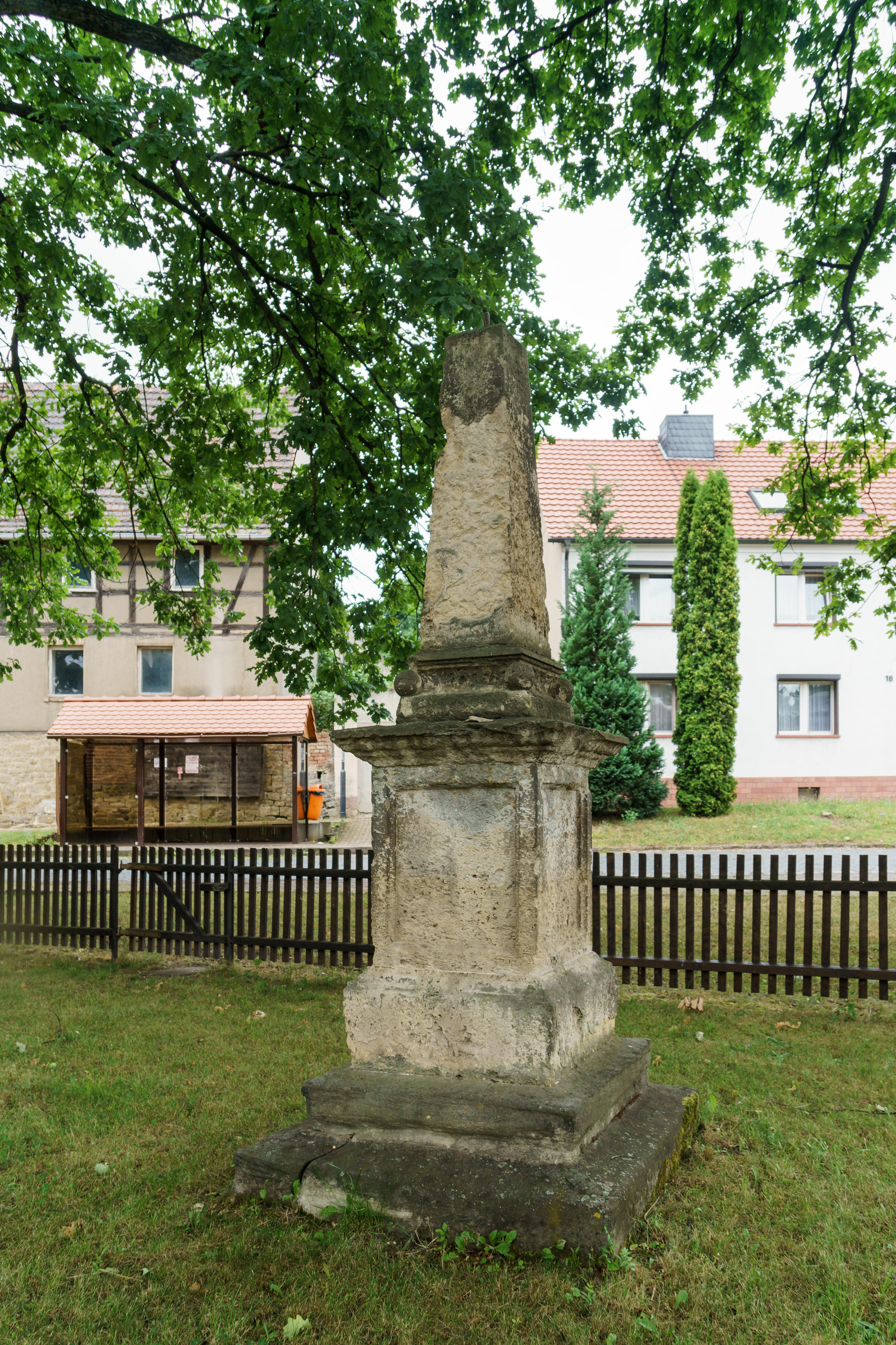 Ehemalige Postmeilensäule von 1723 vor dem Obertor in Pegau errichtet, 1875 abgebrochen, verkauft und für das Kriegerdenkmal auf dem Markt in Elsteraue Profen verwendet.